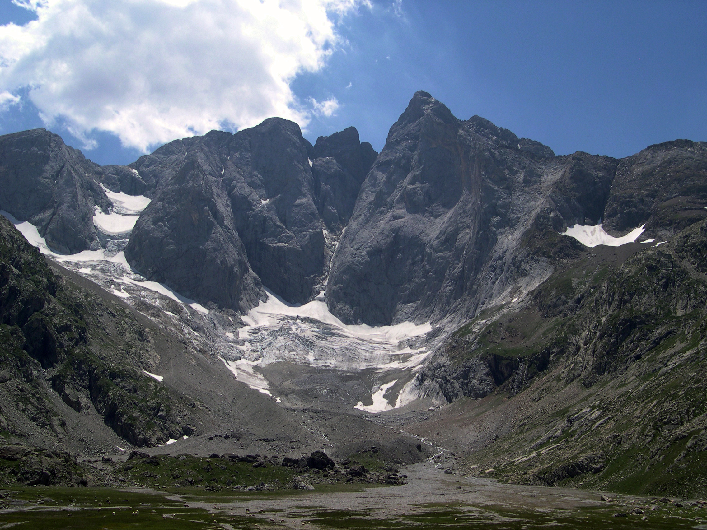 Vignemale du Refuge des Oulettes de Gaube (en Juillet 2005)